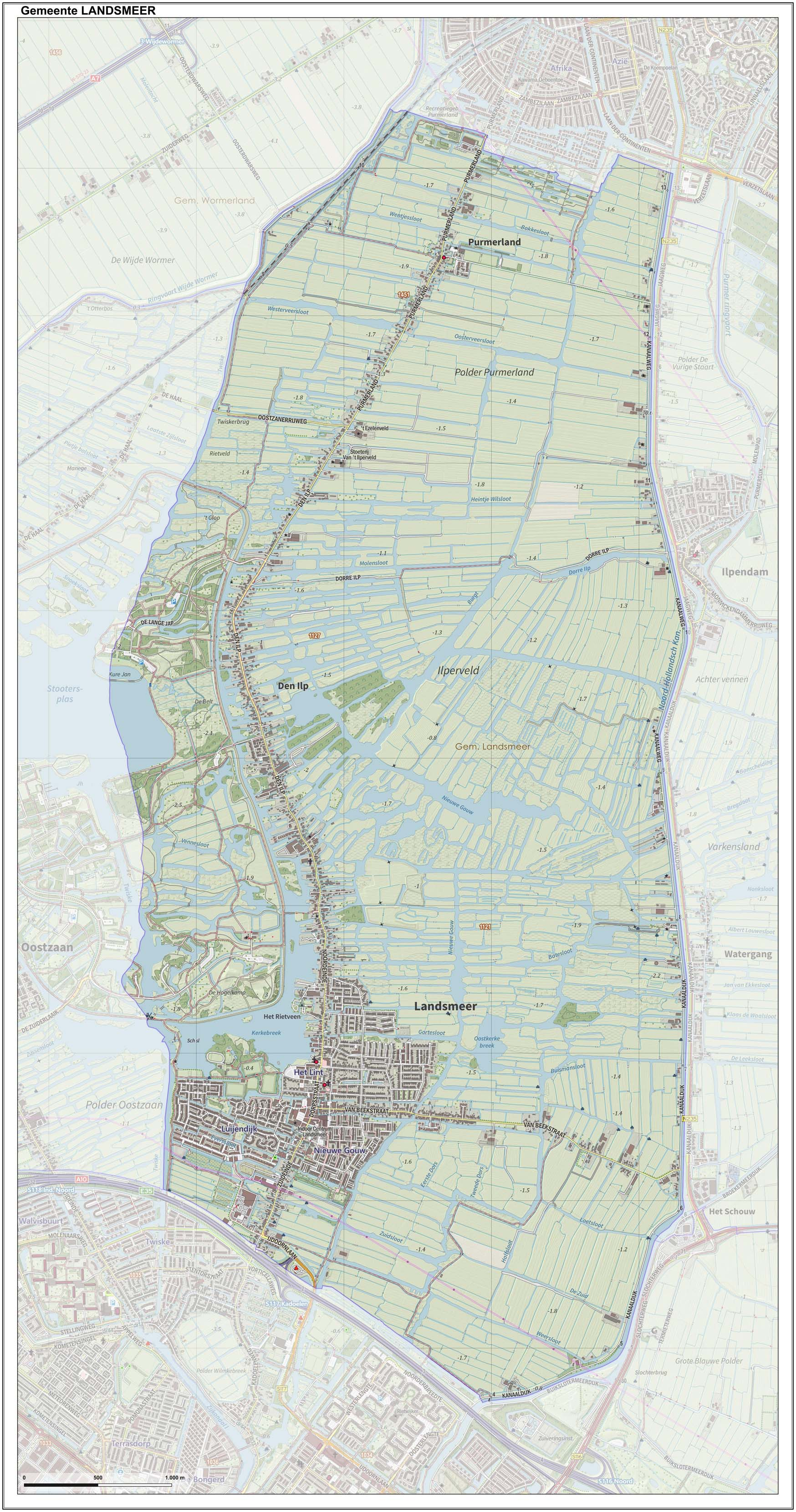 Topografische gemeentekaart. Resolutie: 400 pixels/km. Kaartbeeld samengesteld uit de open geodata van de Top10NL en Top25namen (Kadaster), Creative Commons-BY licentie. Gebouwvlakken uit open geodata BAG extract. Wegen uit de OpenStreetMap, OpenStreetMap community. Reliëfschaduw uit de Actuele Hoogtekaart AHN2. Samenstelling en kleurenschema: Jan-Willem van Aalst, met QGIS. Zie ook de Legenda.